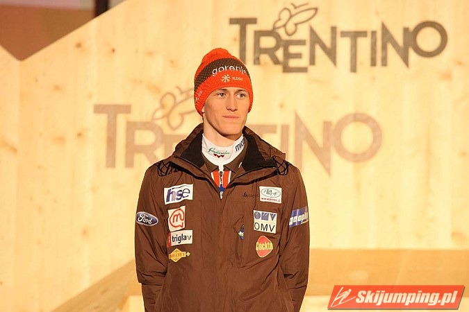 Dekoracja medalowa konkursu indywidualnego mężczyzn na skoczni K-120